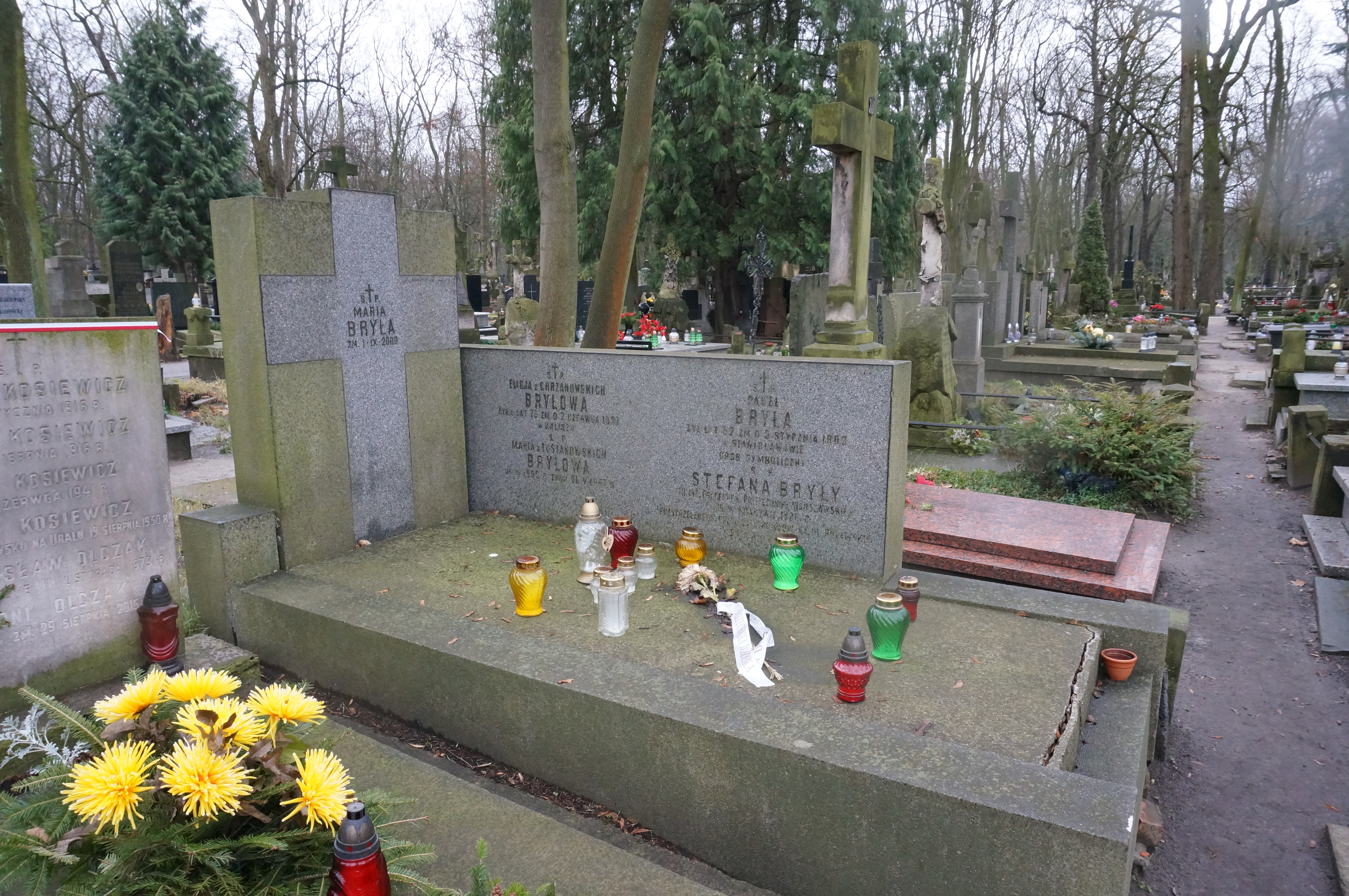 Grób Stefana Bryły na Cmentarzu Powązkowskim (kwatera 57, rząd 4, grób 4)